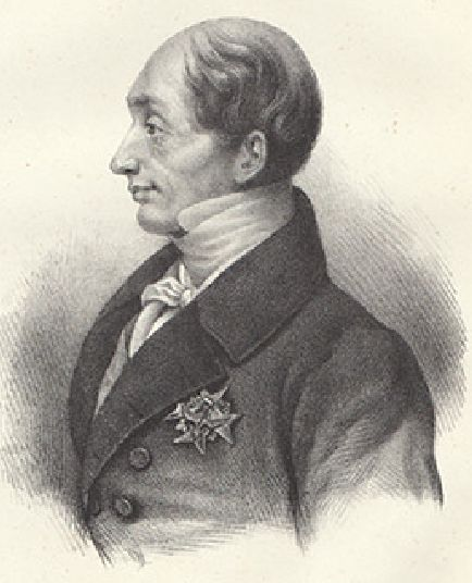 lithographie